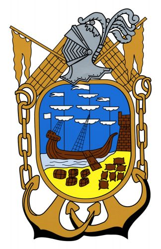 Escudo Limpias, Cantabria (España)